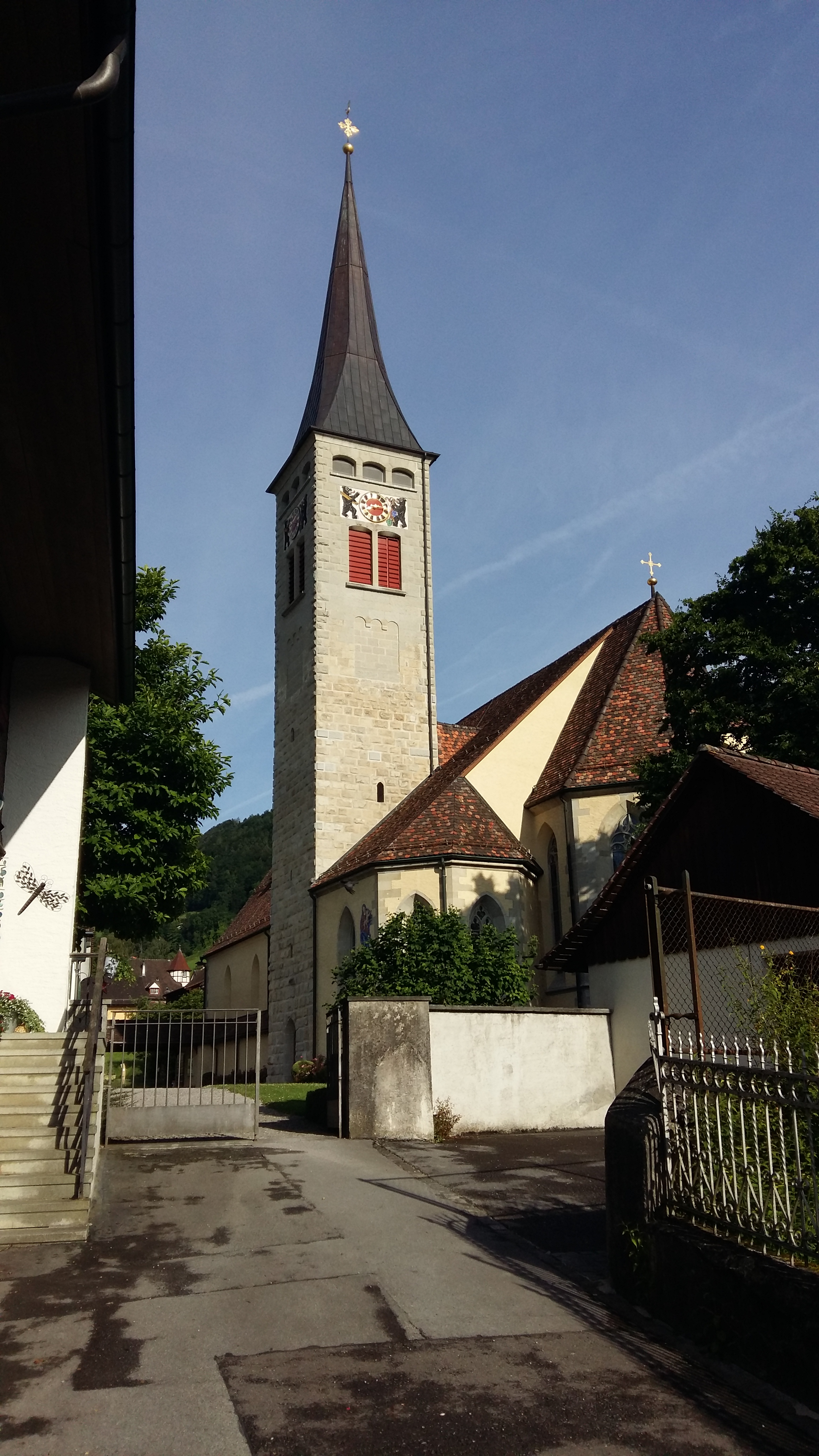 Die Katholische Kirche Unsere Lieben Frauen in Berneck SG. Ostansicht von der Kanzleistrasse aus.